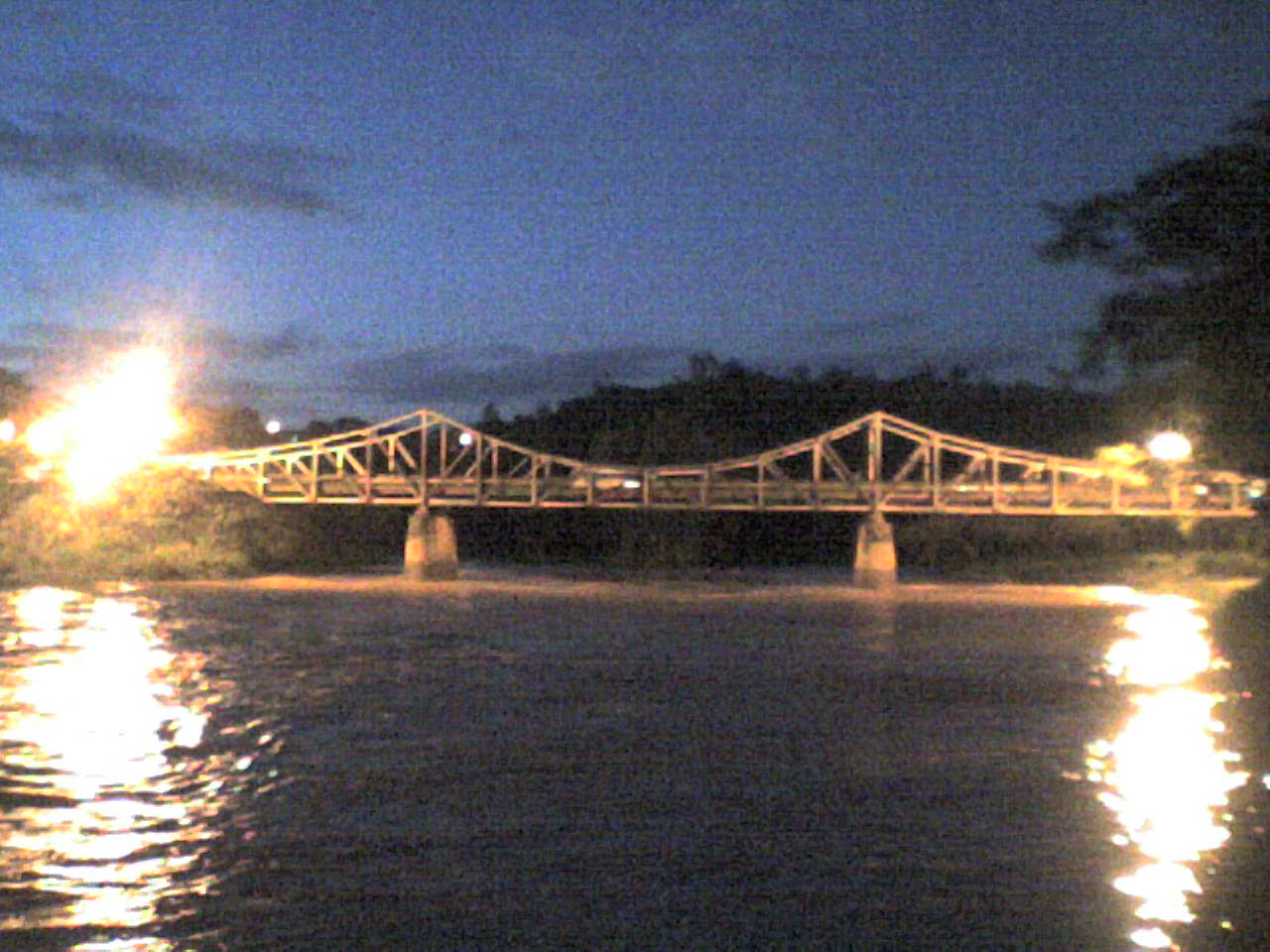 Ponte Euclides da Cunha